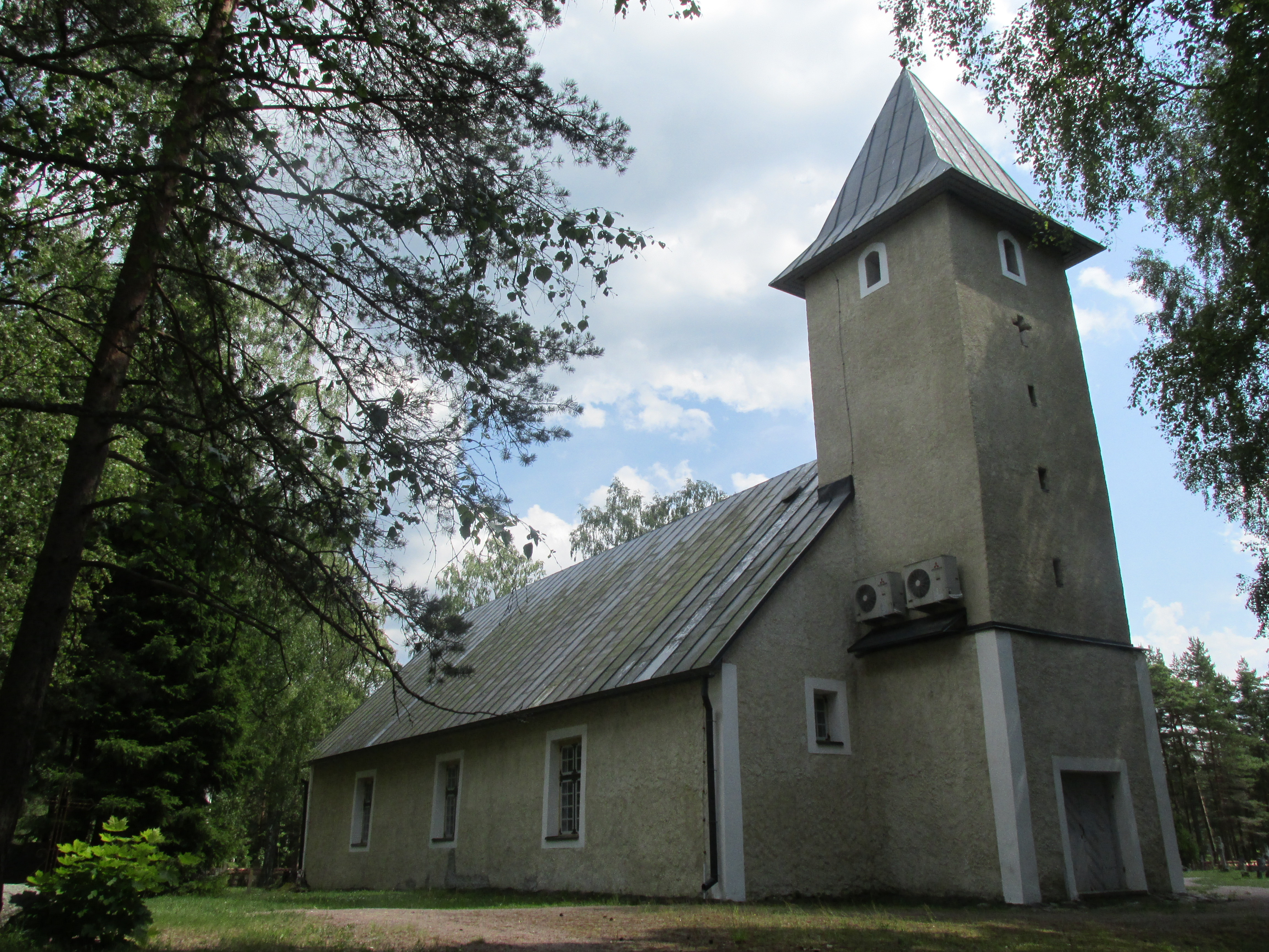 2006 taastatud kabel Rooslepa kalmistul.